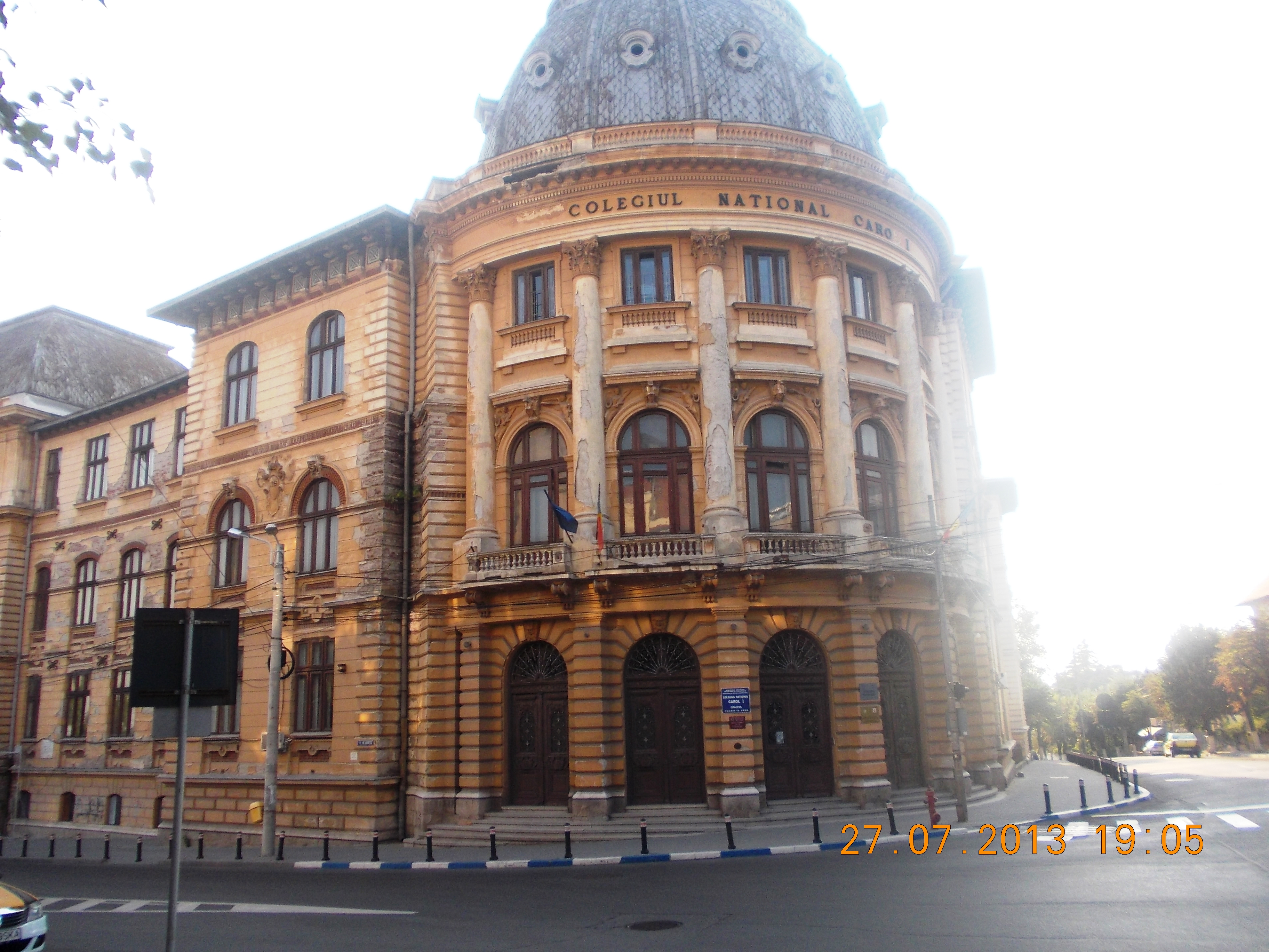 Craiova- COLEGIUL CAROL I